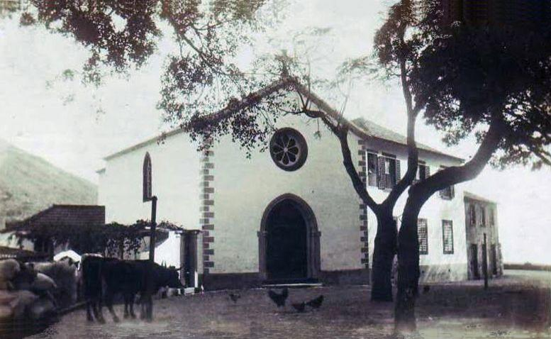 Capela do Senhor dos Milagres com galinhas no adro. Alvenaria de pedra rebocada e pintada, cantaria esculpida com vestígios de pintura, 1500 (c.), reconstrução de 1804 e 1956. Fotografia de 1920 (c.). Largo da Capela dos Milagres, Machico, ilha da Madeira.